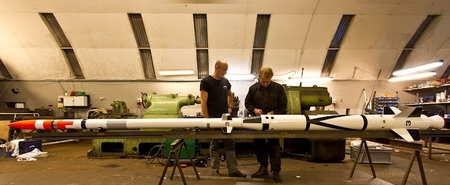 Smaragd ligger klar i hangaren på Amager, men de sidste detaljer på elektronikken mangler.